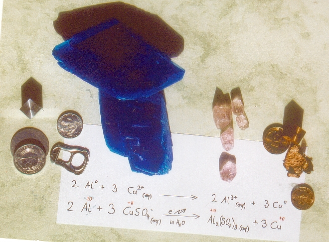 Aluminium und Kupfersulfat bilden Kupfer und Aluminiumsulfat, Veranschaulichung des Reaktionsschemas